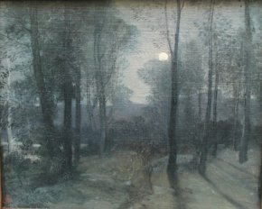 Pierre-Victor Galland (1822-1892) Forest Clearing at Night Oil on board - 28 x 36,5 cm Beauvais, Musée départemental de l’Oise